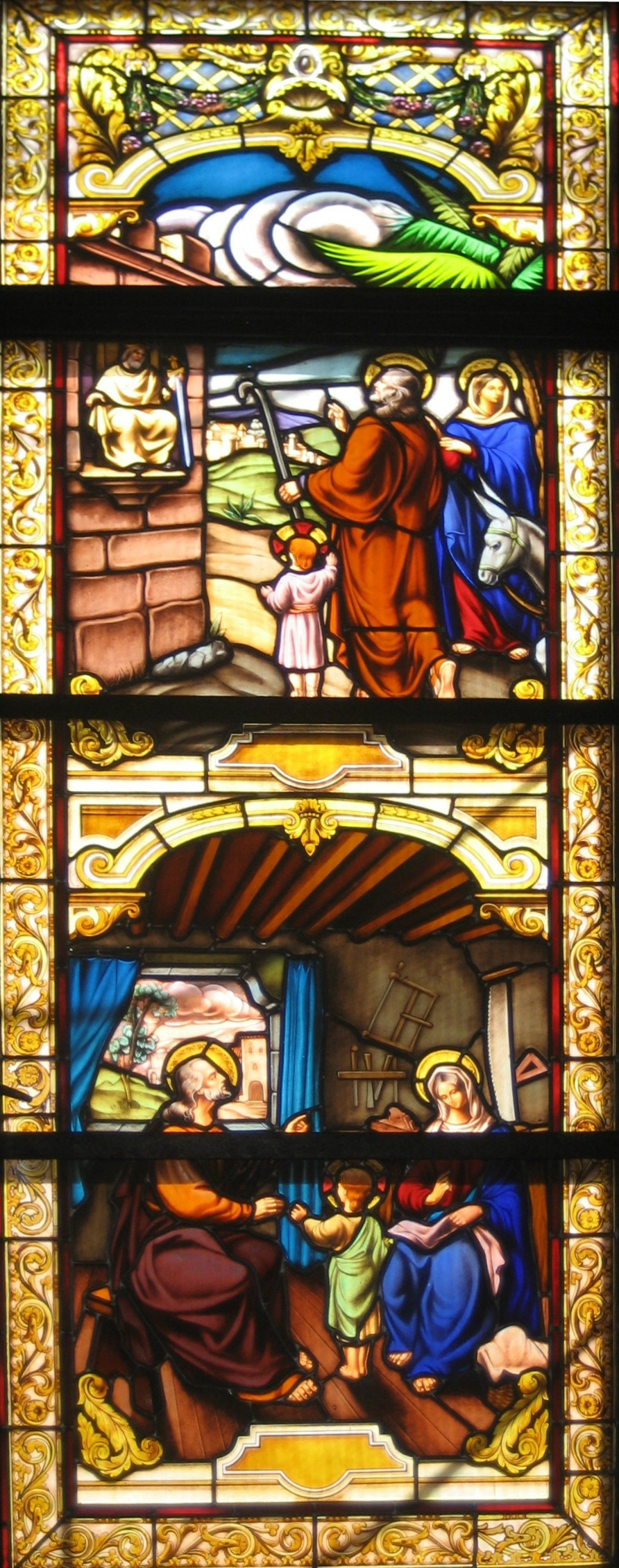 Cuba, Parroquia de San José de Jatibonico: 6-Vitral del regreso a Nazareth.